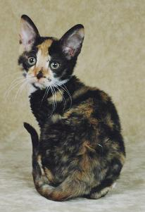 german rex